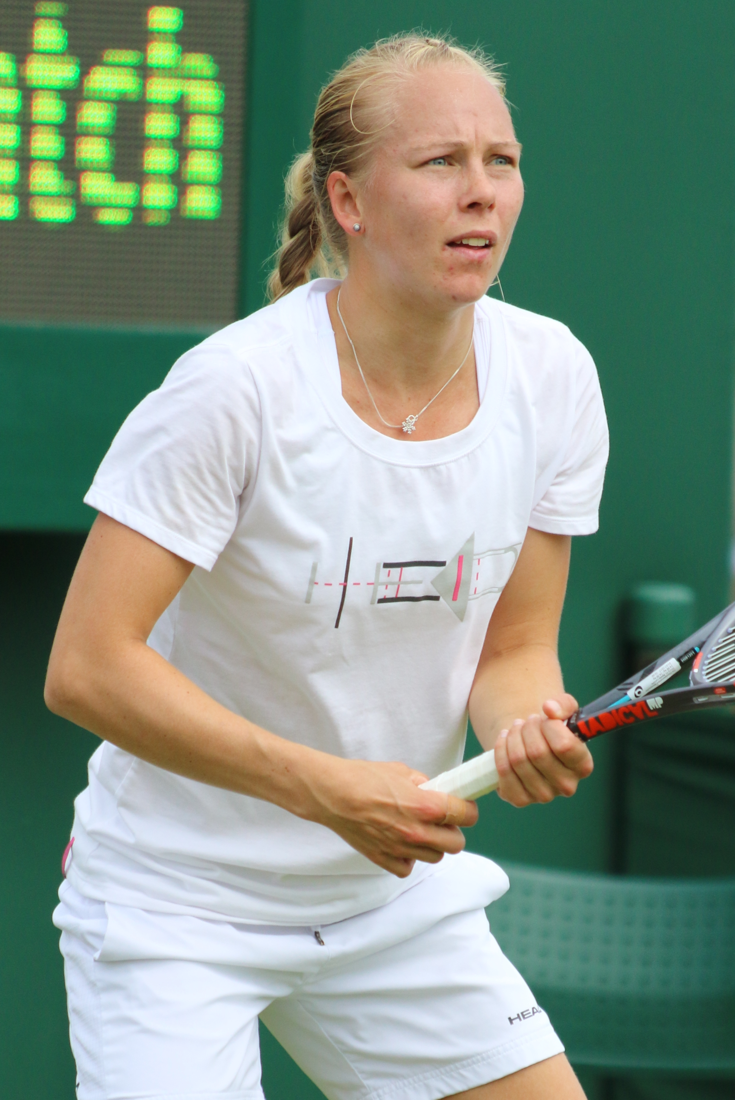 Larsson WM17 (3)